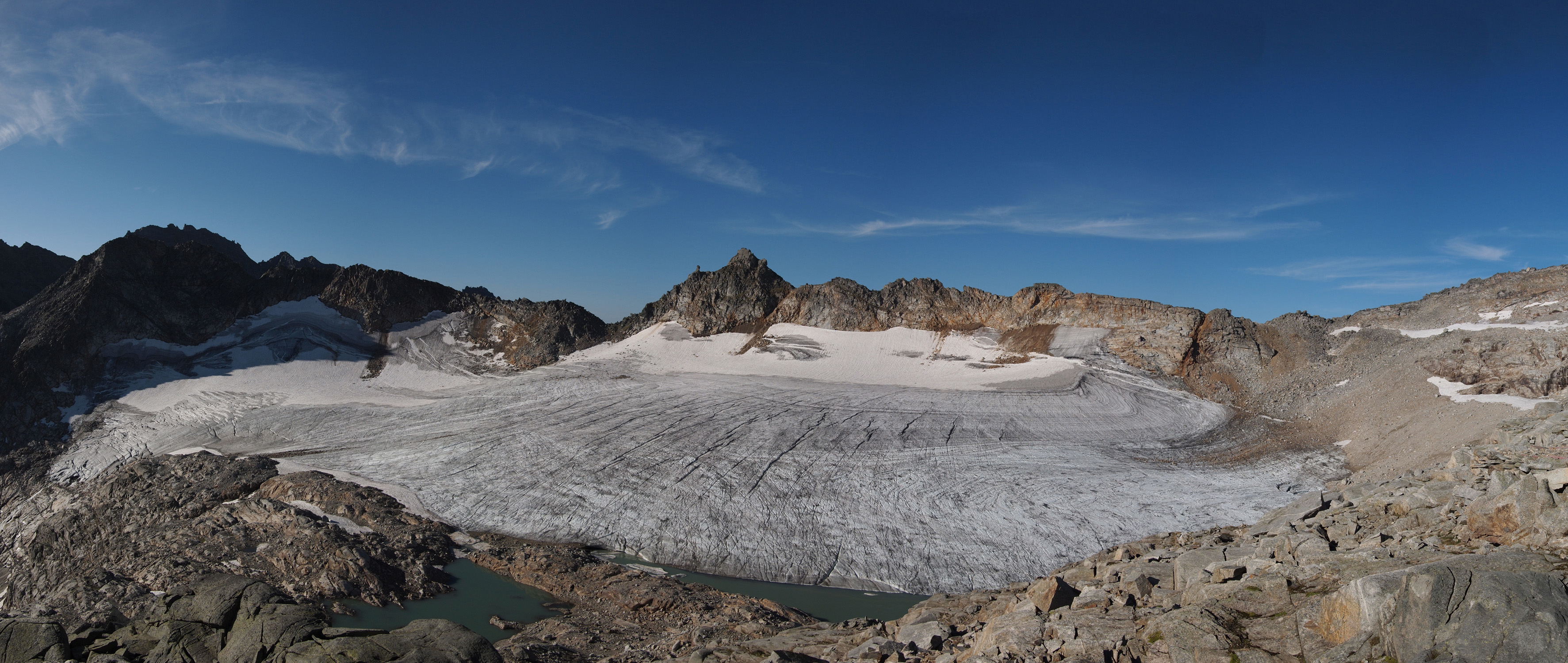 Panorama über das Goldbergkees 2012, ausgeapert